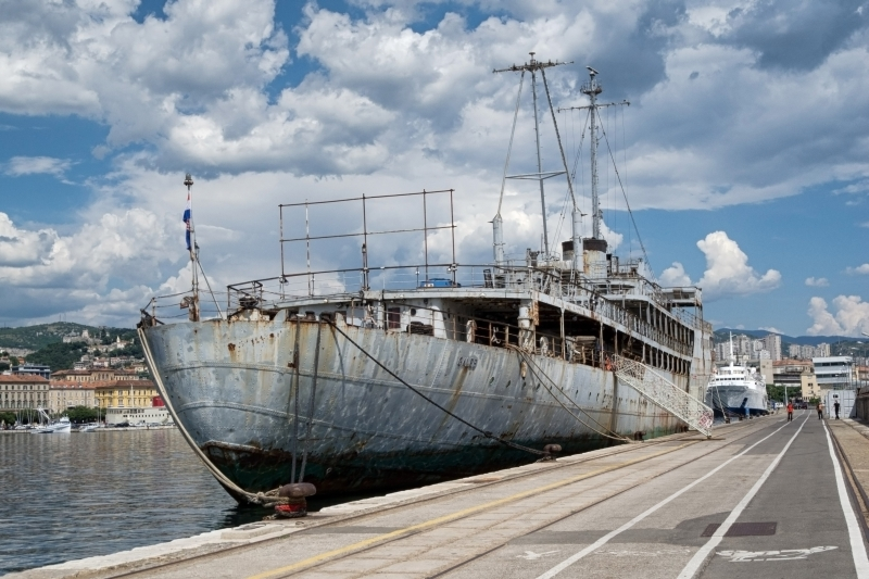 Riječka luka Galeb